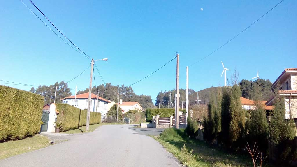 Vista do Carballo, Sedes, Narón.